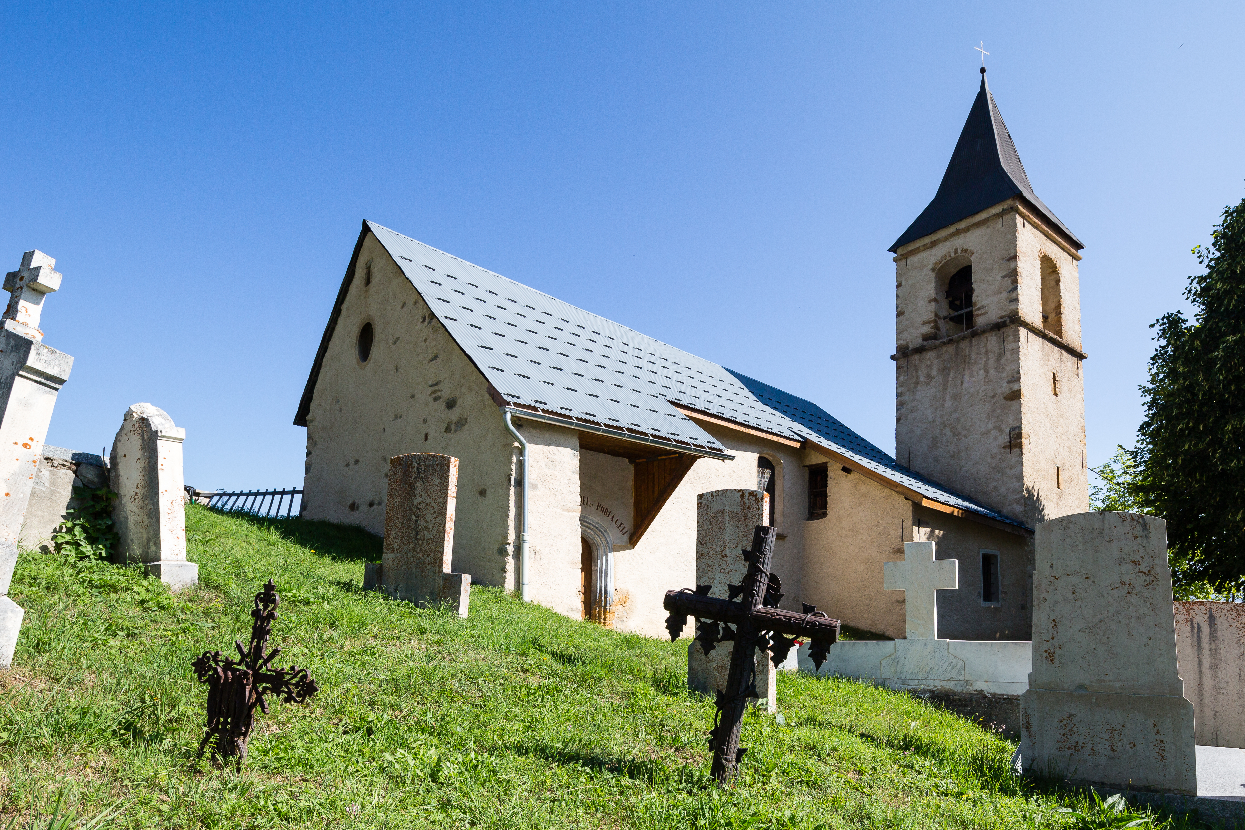 Église Notre-Dame de l'Assomption de Villard-Notre-Dame (France).